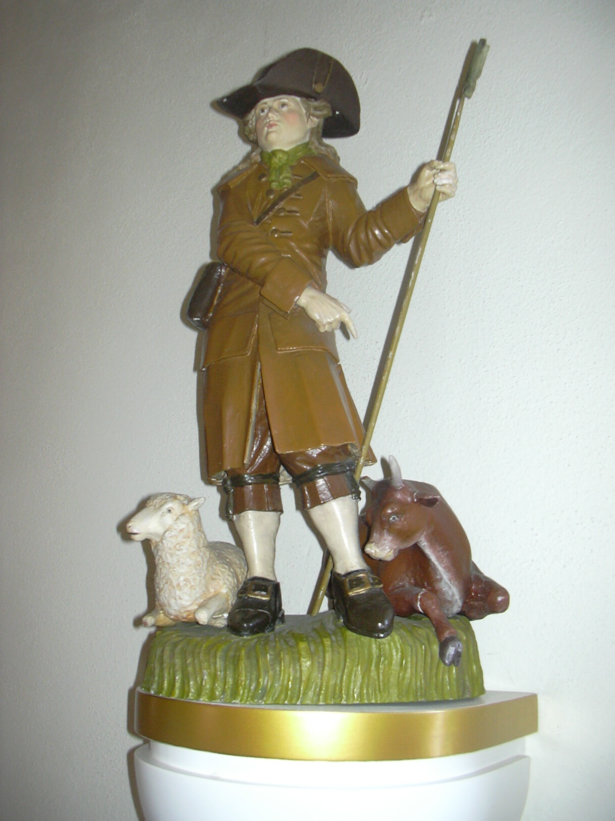 St. Wendelin of Trier, in Wendelinus Chapel, Brücken (Mömbris), Bavaria